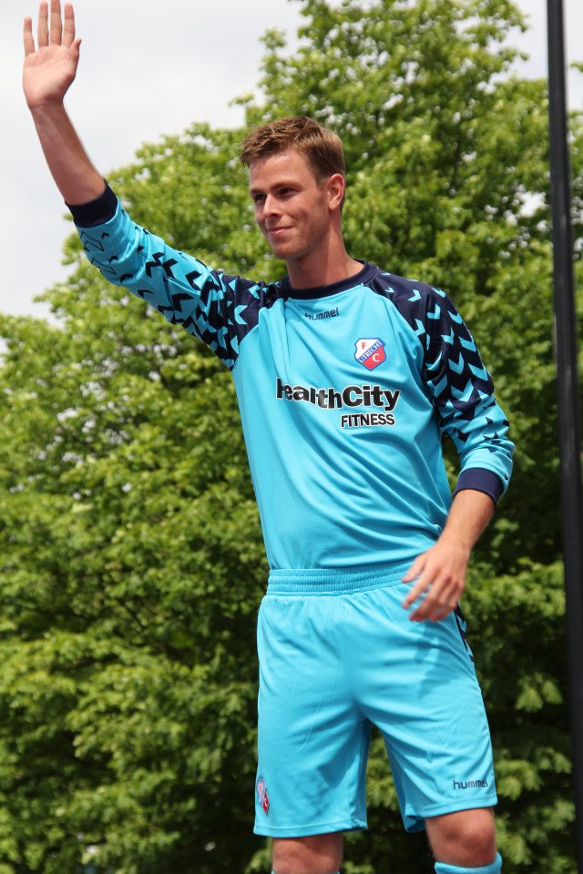 presentatie van de nieuwe selectie van FC Utrecht